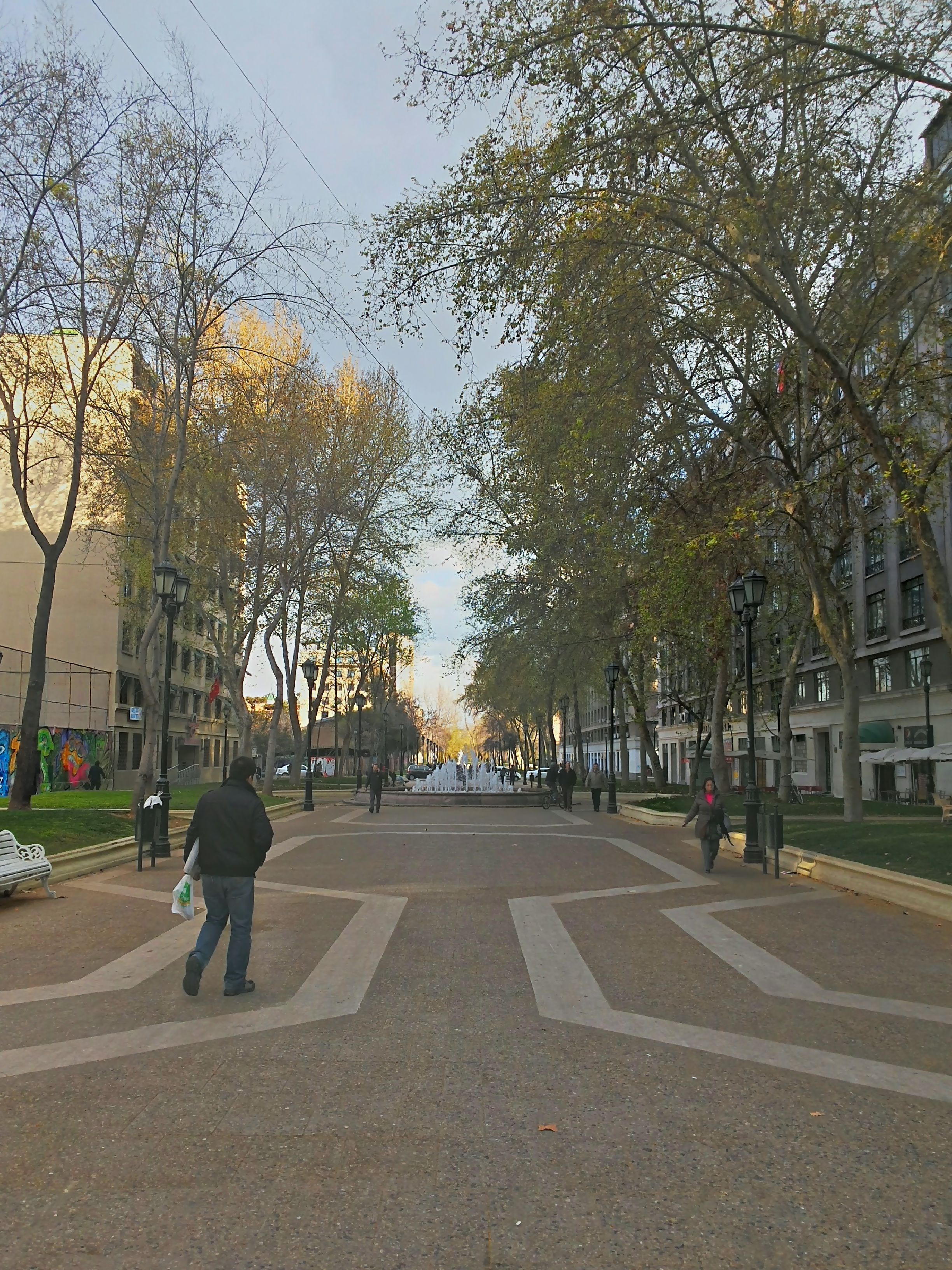 Barrio Cívico, Eje Bulnes y Parque Almagro This is a photo of a national monument in Chile: 2017